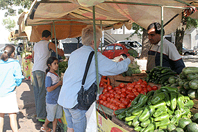 Asunción. Feria de hortalizas en barrio R. L. Petit